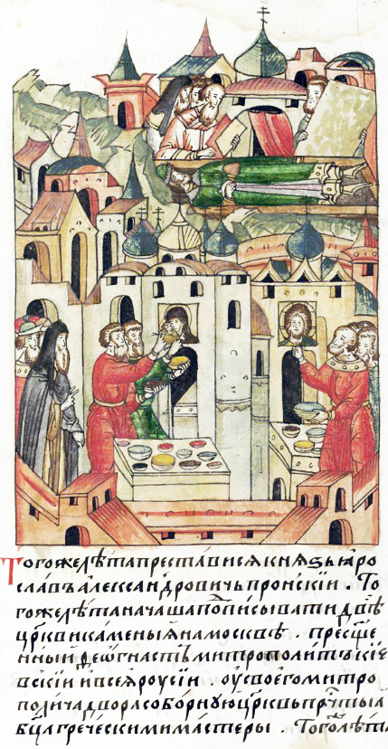 ЛИЦЕВОЙ ЛЕТОПИСНЫЙ СВОД В том году преставился князь Ярослав Александрович Пронский. В том же году начали расписывать две церкви каменные на Москве. Одну по повелению Феогноста, митрополита Киевского и всея Руси — соборную церковь Пречистыя Богородицы на митрополичьем дворе — расписывали греческие мастера. В том же году и [закончили расписывать.]